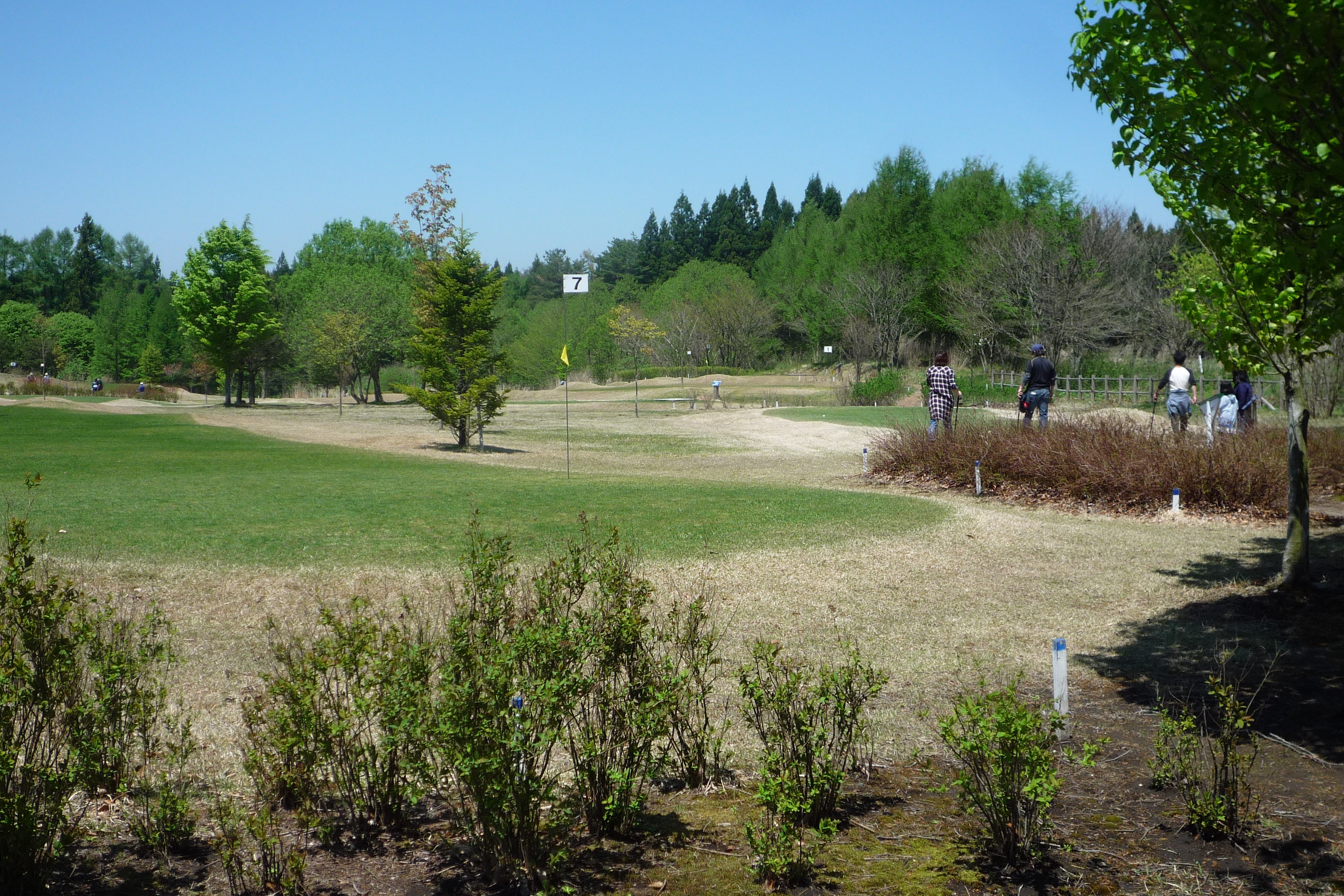 パークゴルフ場